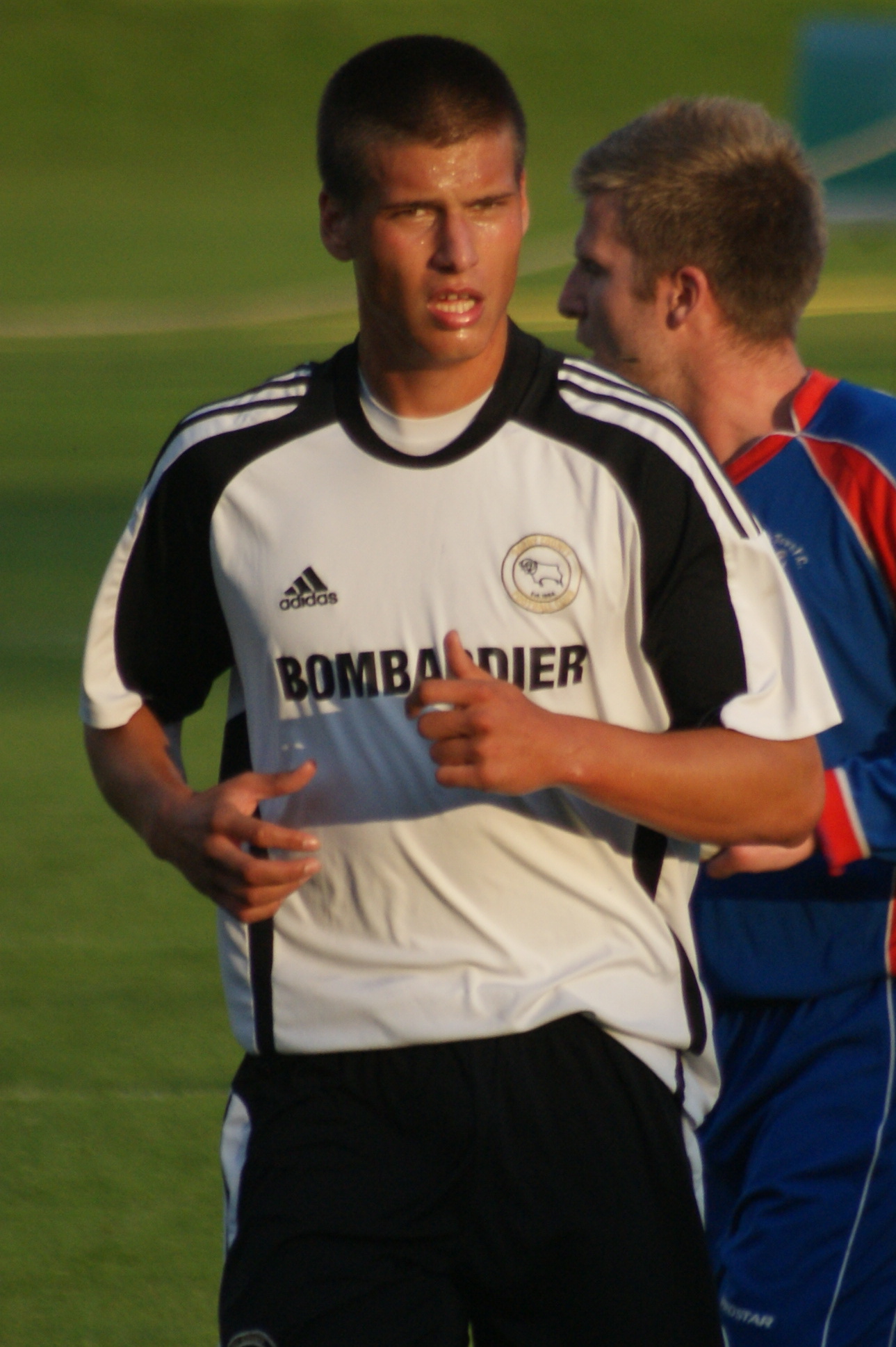 Alexander Prijovic